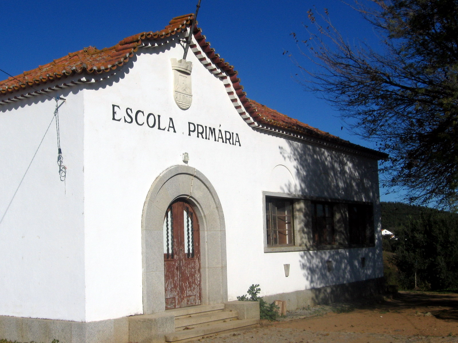 Antiga Escola Primária, São Brissos, Santiago do Escoural, Montemor-o-Novo, Portugal